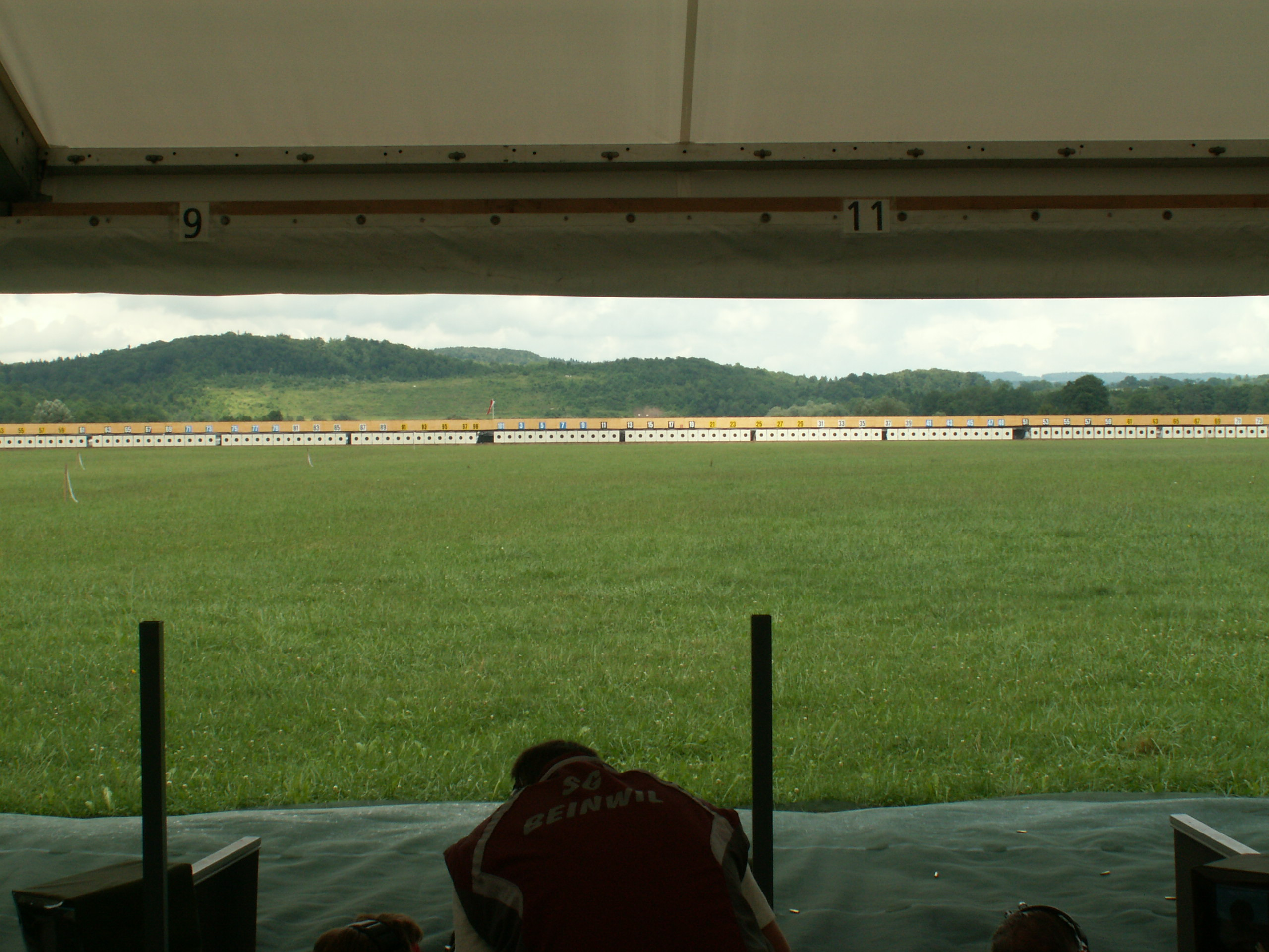 Blick auf die Scheiben 300m aus Sicht des Schützen (Eidg. Schützenfest Frauenfeld 2005)